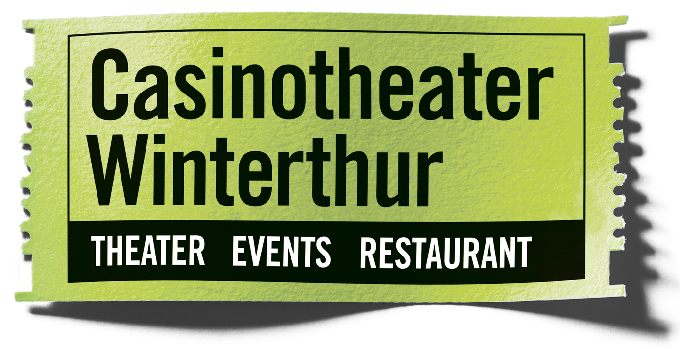 Logo CTW 2015